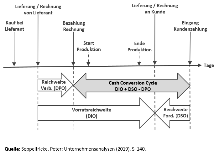 Die Abbildung habe ich selbst mit Powerpoint angefertigt. Ein Urheberkonflikt besteht nicht.